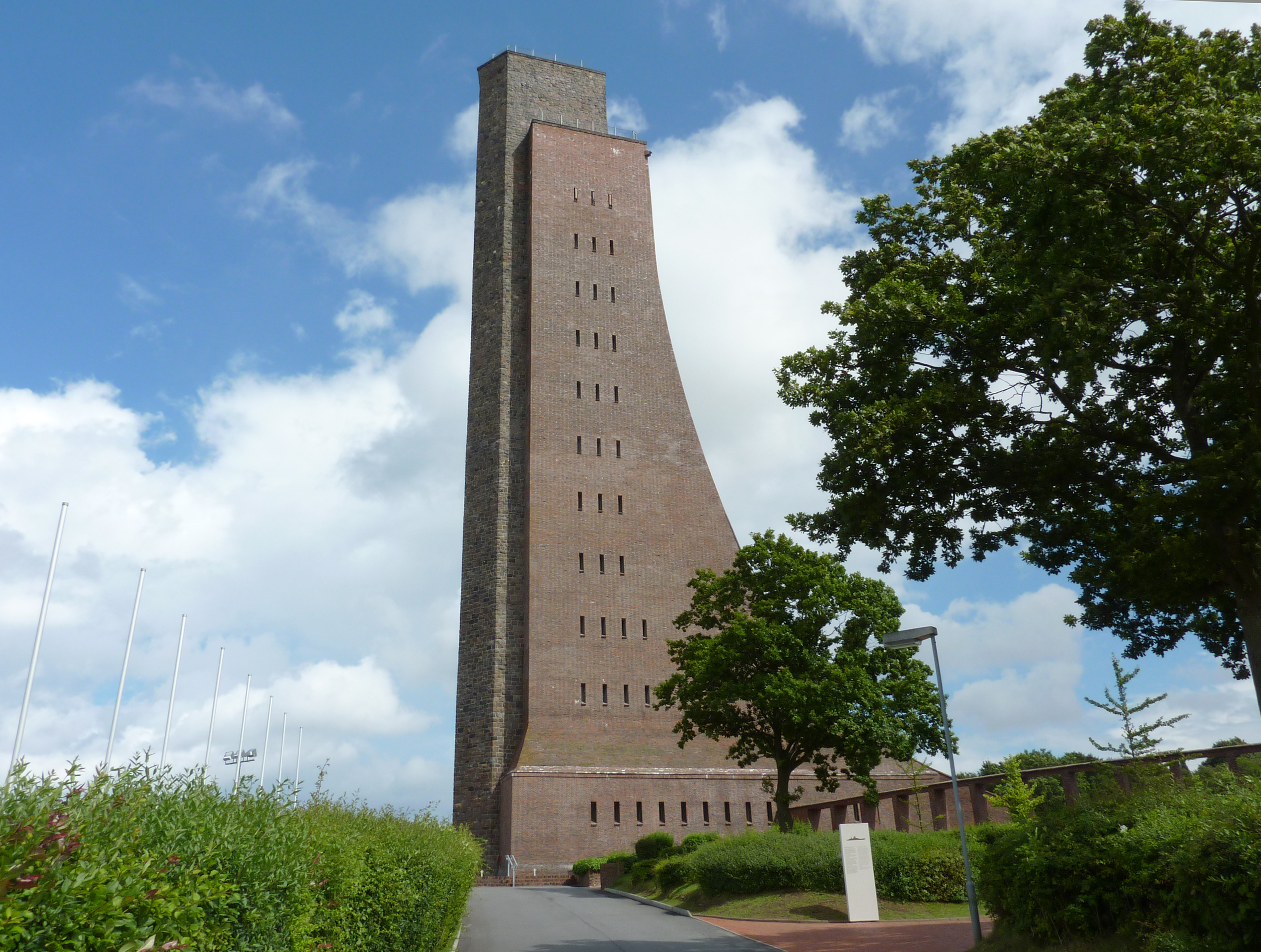 Marineehrenmal Laboe